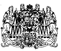 Escudo del arzobispo Antonio Ibañes de la Riva Herrera